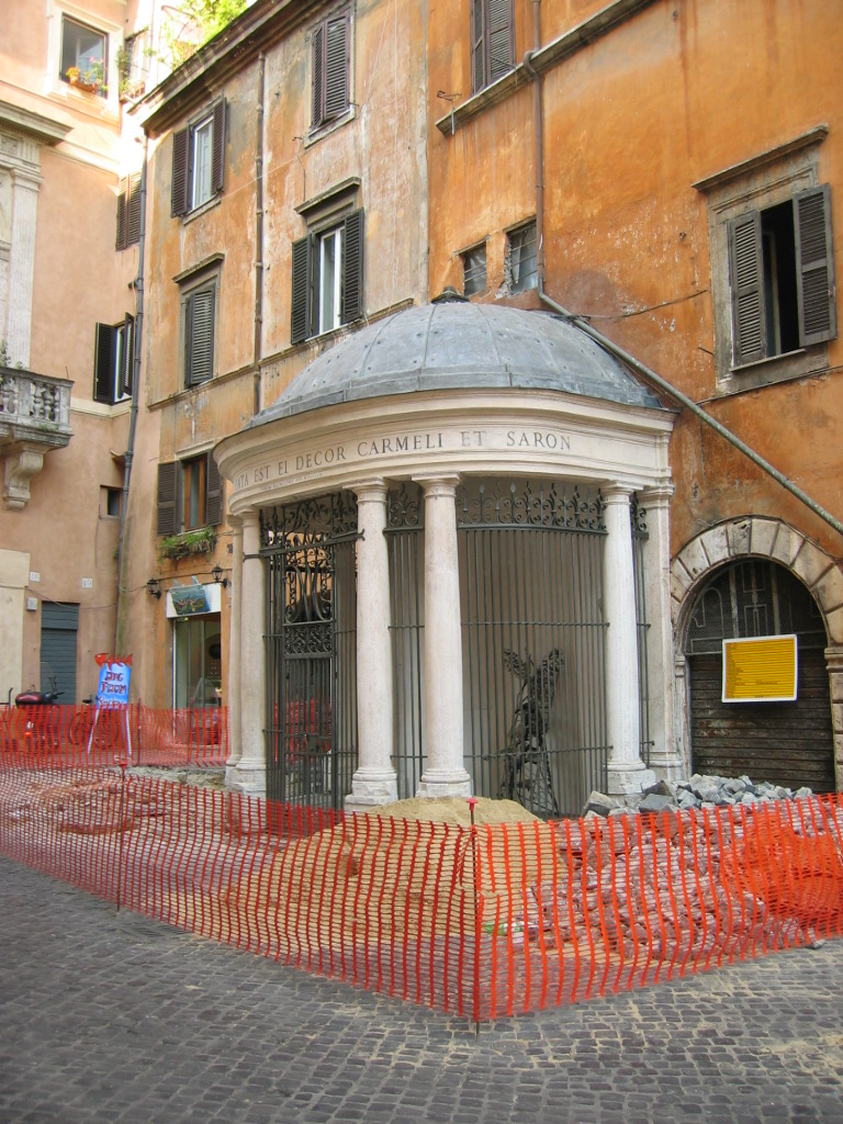 Tempietto del Carmelo, Piazza Costaguti, Roma